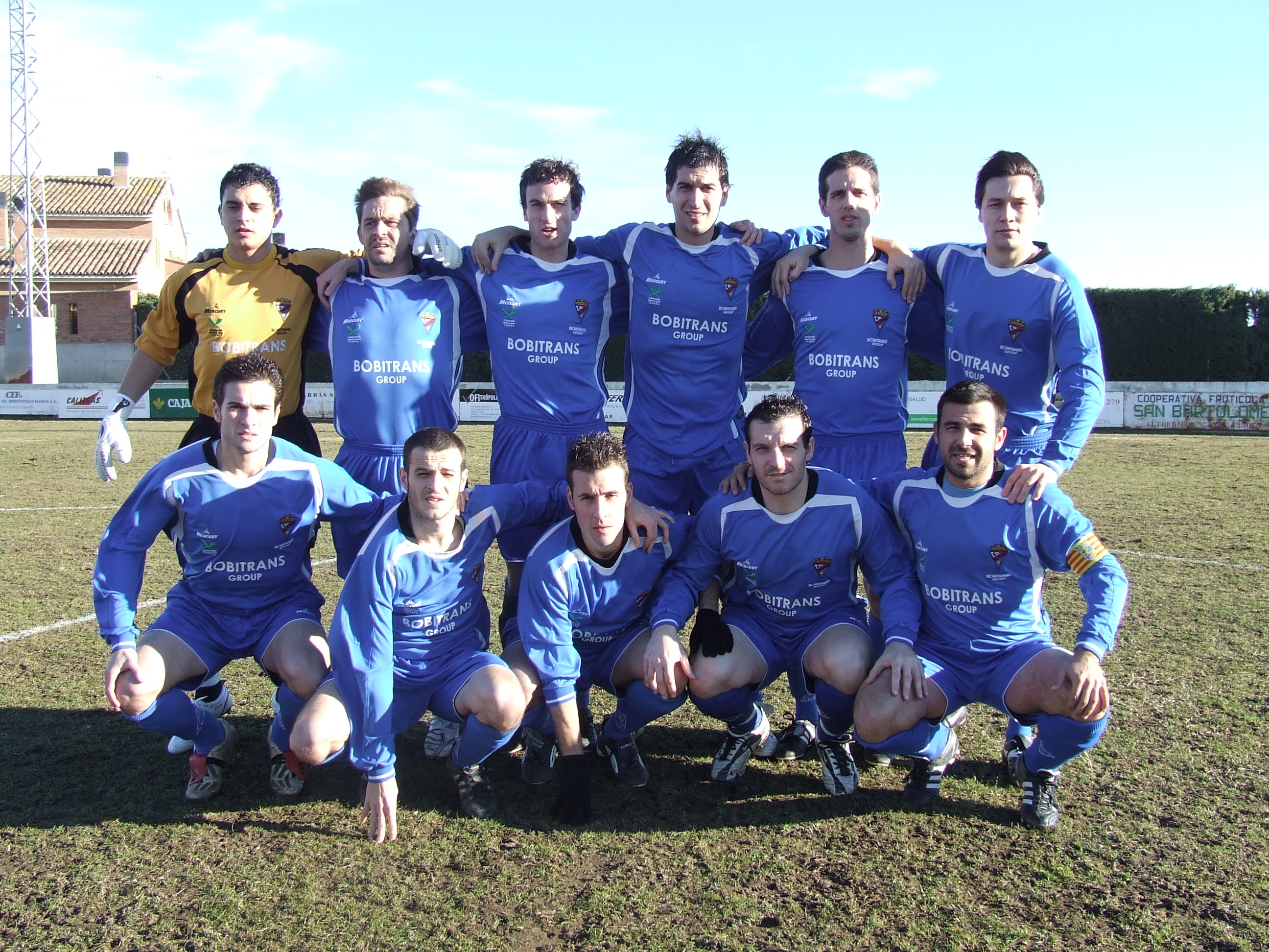 Valdefierro (Altorricón 4 - Valdefierro 0 (24-01-2009))